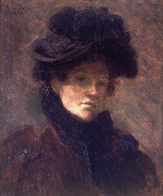 Self-portrait